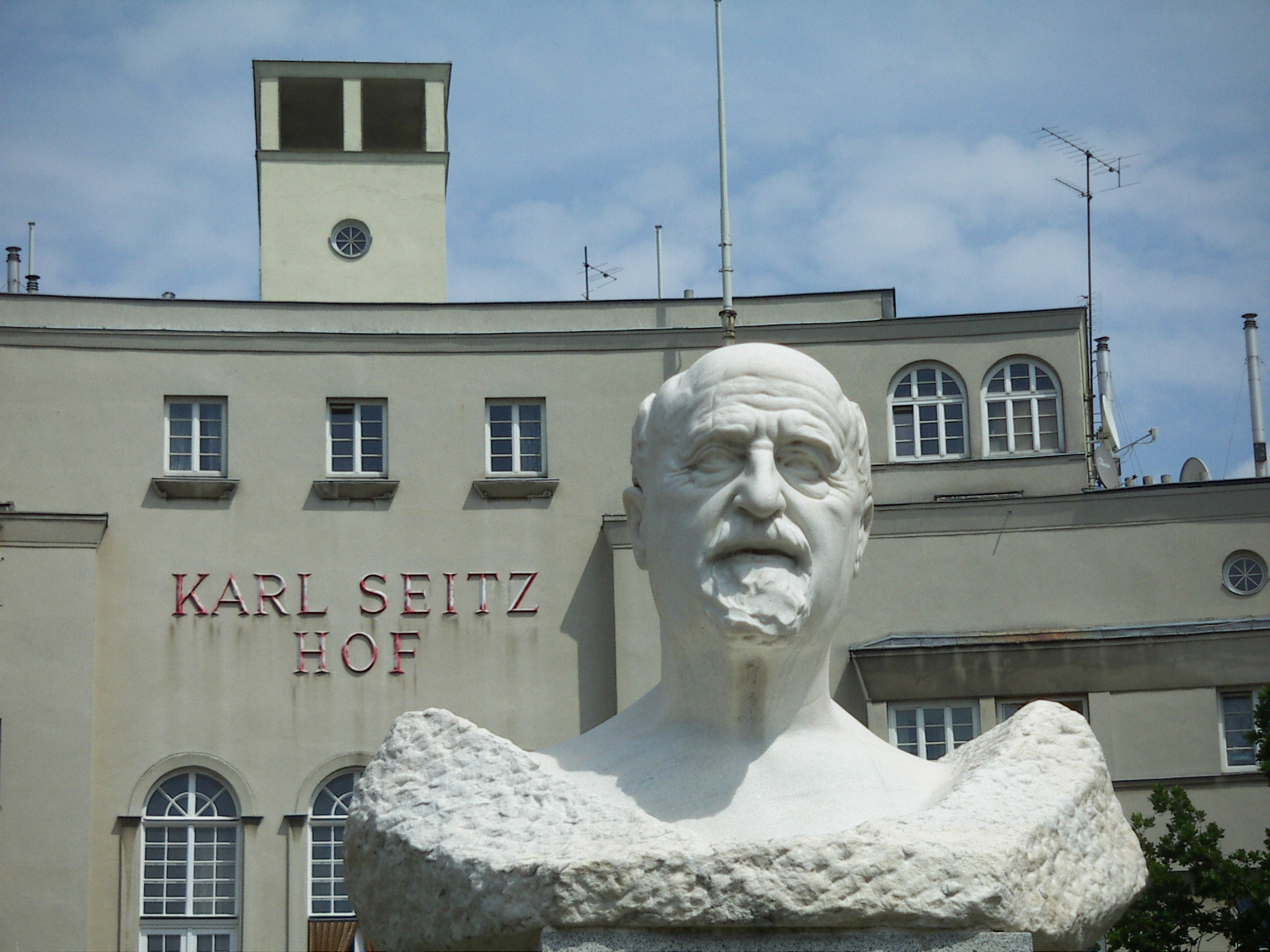 Karl Seitz 1869 - 1950, Bürgermeister, Vienna, Karl-Seitz-Hof